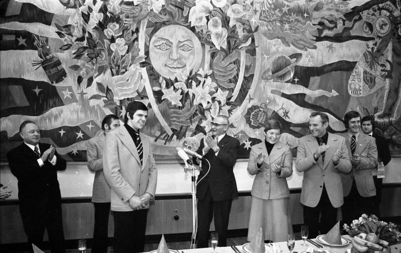 Berlin, Empfang für DDR-Olympiamannschaft ADN-ZB/Koard 17.2.76 Berlin: Empfang für erfolgreiche DDR-Olympiamannschaft Mit herzlichem Beifall danken Gäste und Gastgeber des festlichem Empfanges, den das Präsidium des DTSB der DDR zu Ehren der Teilnehmer an den XII. Olympischen Winterspielen am 17.2. im Interhotel "Stadt Berlin" gab, dem Olympiasieger im Rennschlitten-Doppelsitzer Hans Rinn( 3.v.l.), für seine Dankesworte am Parteiführung und Regierung der DDR. V.l.: Erich Mielke, Manfred Ewald (halb verd.), Hans Rinn, Paul Verner, Margit Schumann, Rudolf Hellmann, Ulrich Wehling. Abgebildete Personen: Mielke, Erich: Minister für Staatssicherheit, Armeegeneral, Politbüro des Zentralkomitees (ZK) der SED, DDR (GND 118977490) Rinn, Hans: Rennschlittensportler, Olympiateilnehmer 1976-1984, DDR Verner, Paul: Vorsitzender des Staatsrates, Sekretär des Zentralkomitees der SED, Präsident des Nationalrates der Nationalen Front, DDR Schumann, Margit: Rennschlittensportlerin, Olympiade 1972, 1976 und 1980, DDR Wehling, Ulrich: Skisportler, Nordische Kombination, SC Traktor Oberwiesenthal, Olympiateilnehmer 1972, 1976 und 1980, DDR